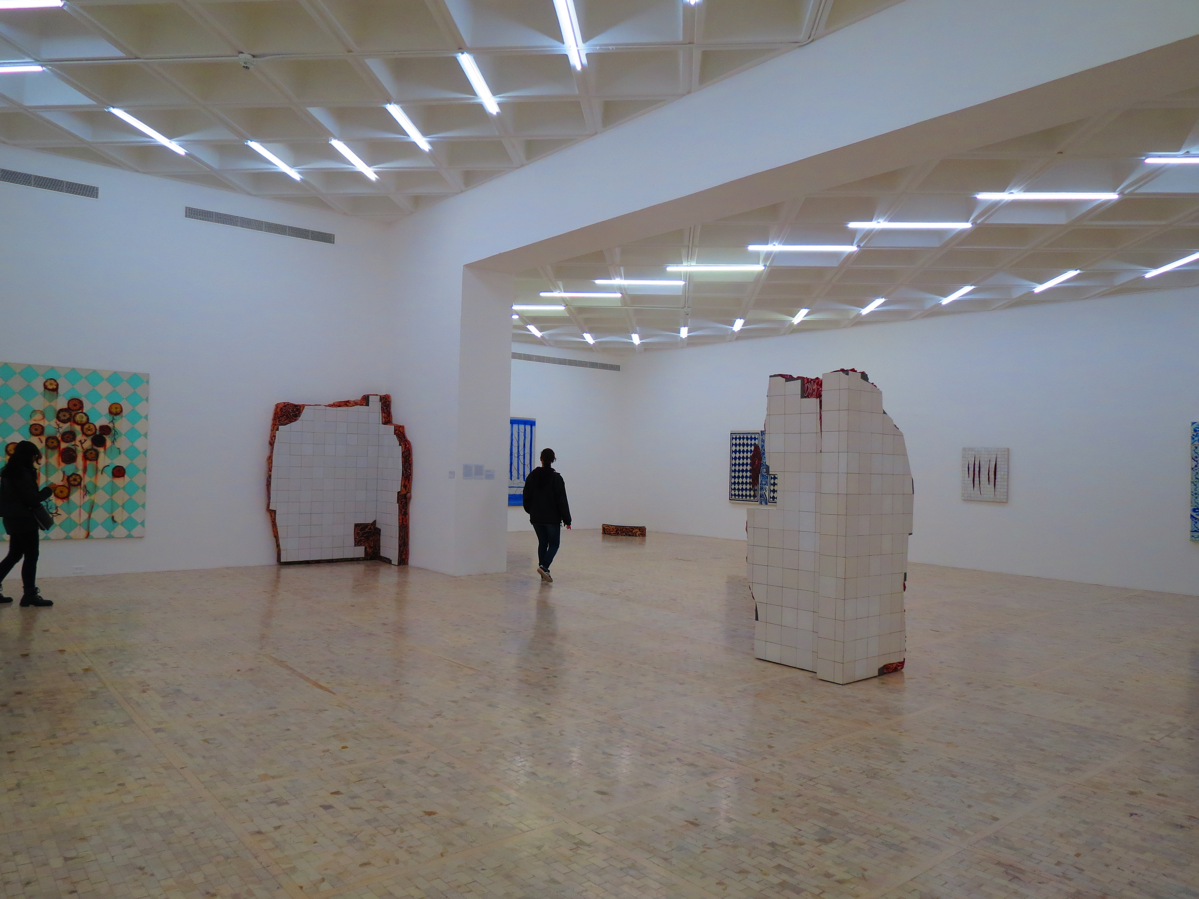 Vista de la exposición de Adriana Varejão, Otros cuerpos detrás en el Museo Rufino Tamayo. La exposición se compone de una retrospectiva de la obra de la artista a partir de dos series: Ruinas de carne seca y Polvo.